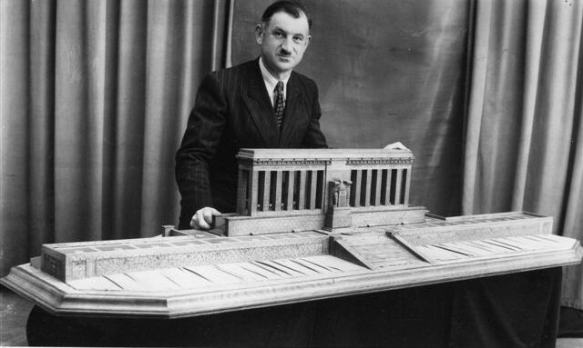 André Toison et la Maquette Cote 204